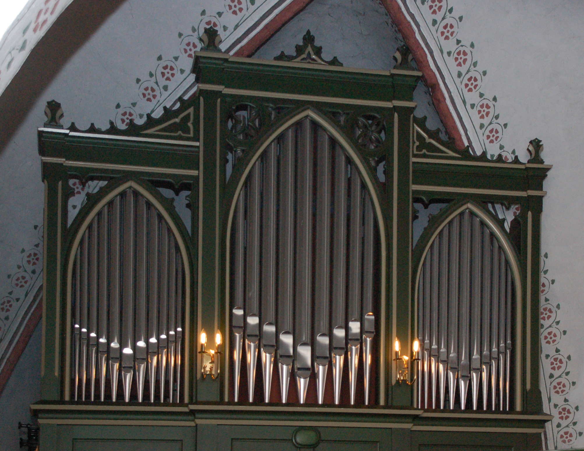 Orgelprospekt der Marienkirche